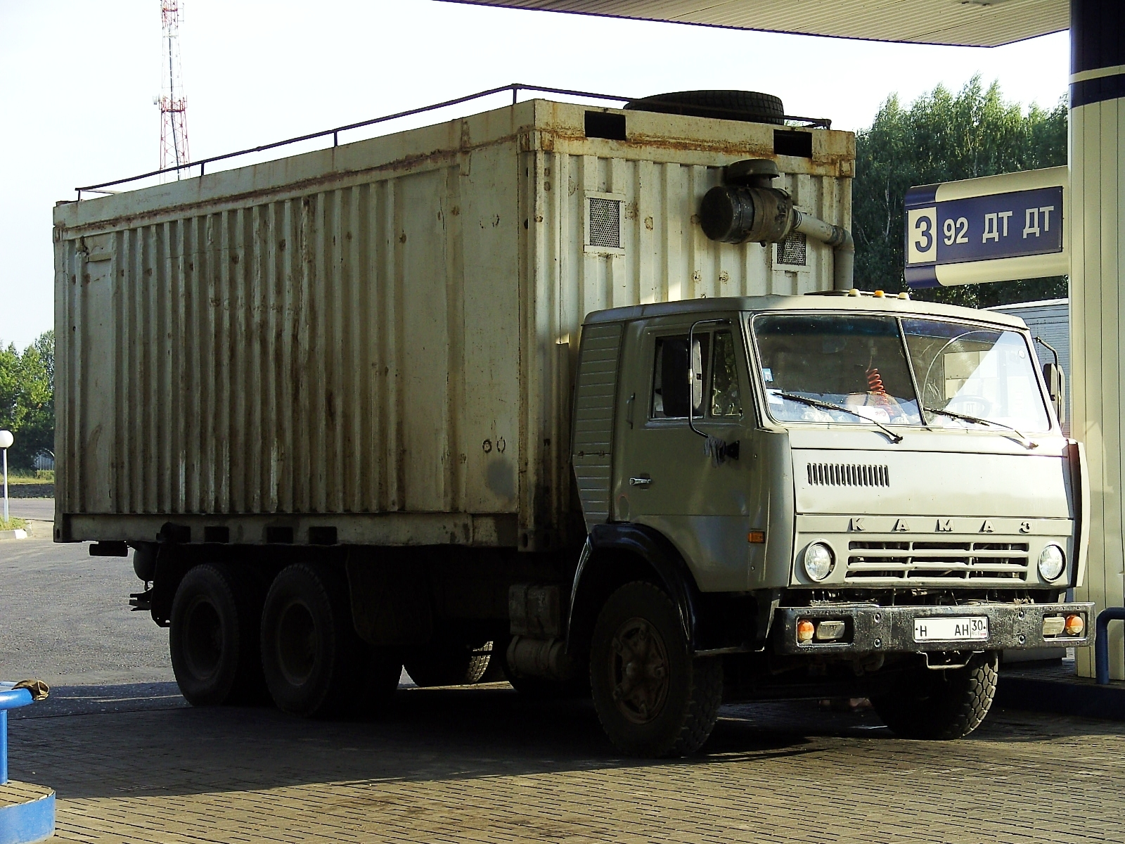 Kamaz Lastwagen in Russland.